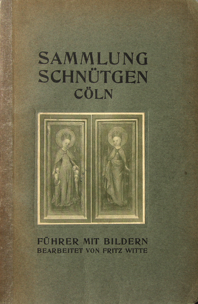 Titelblatt des ersten Museumsführers für die Sammlung Schnütgen, 1910